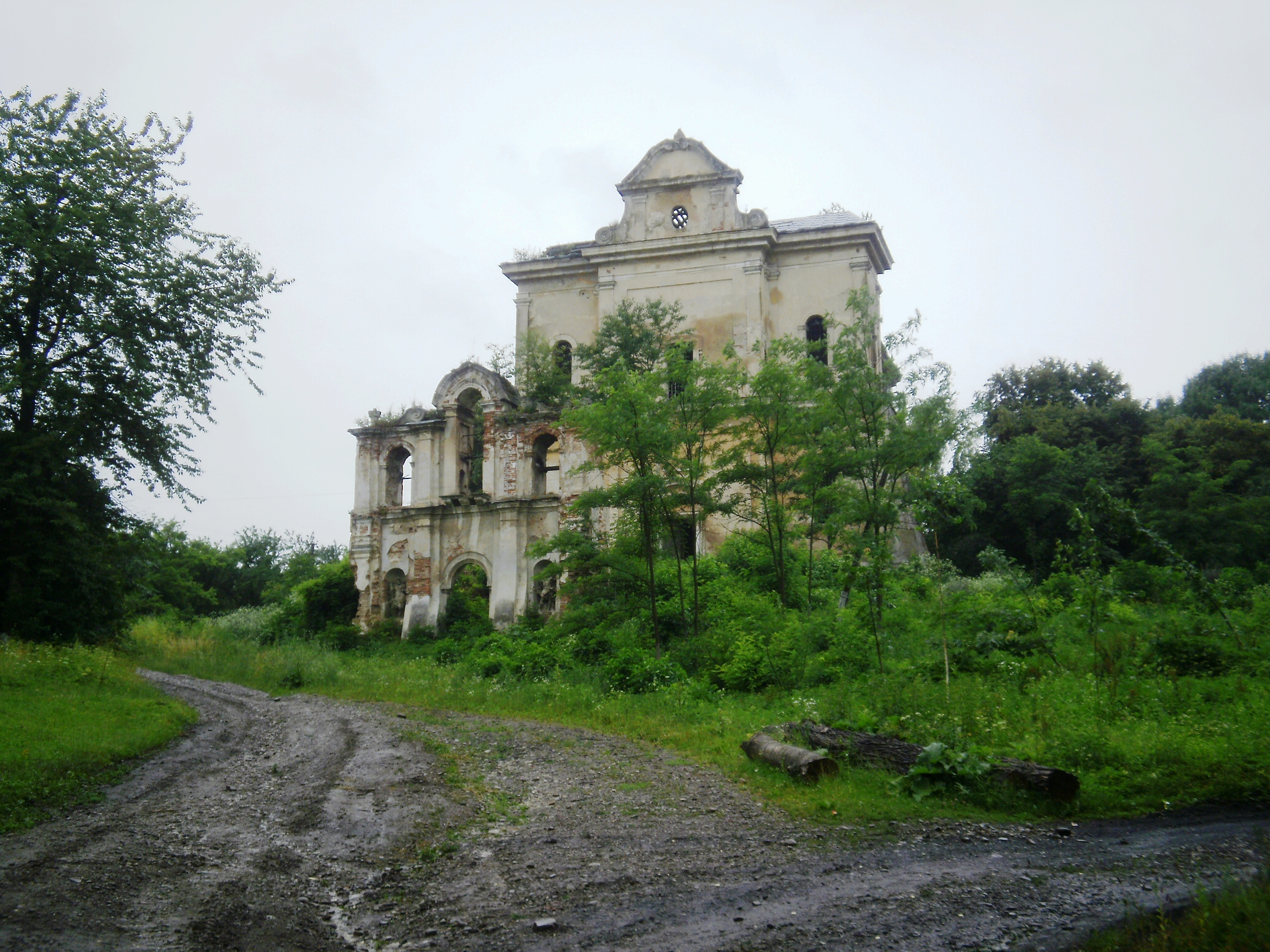 Костел (мур.), с. Кукільники